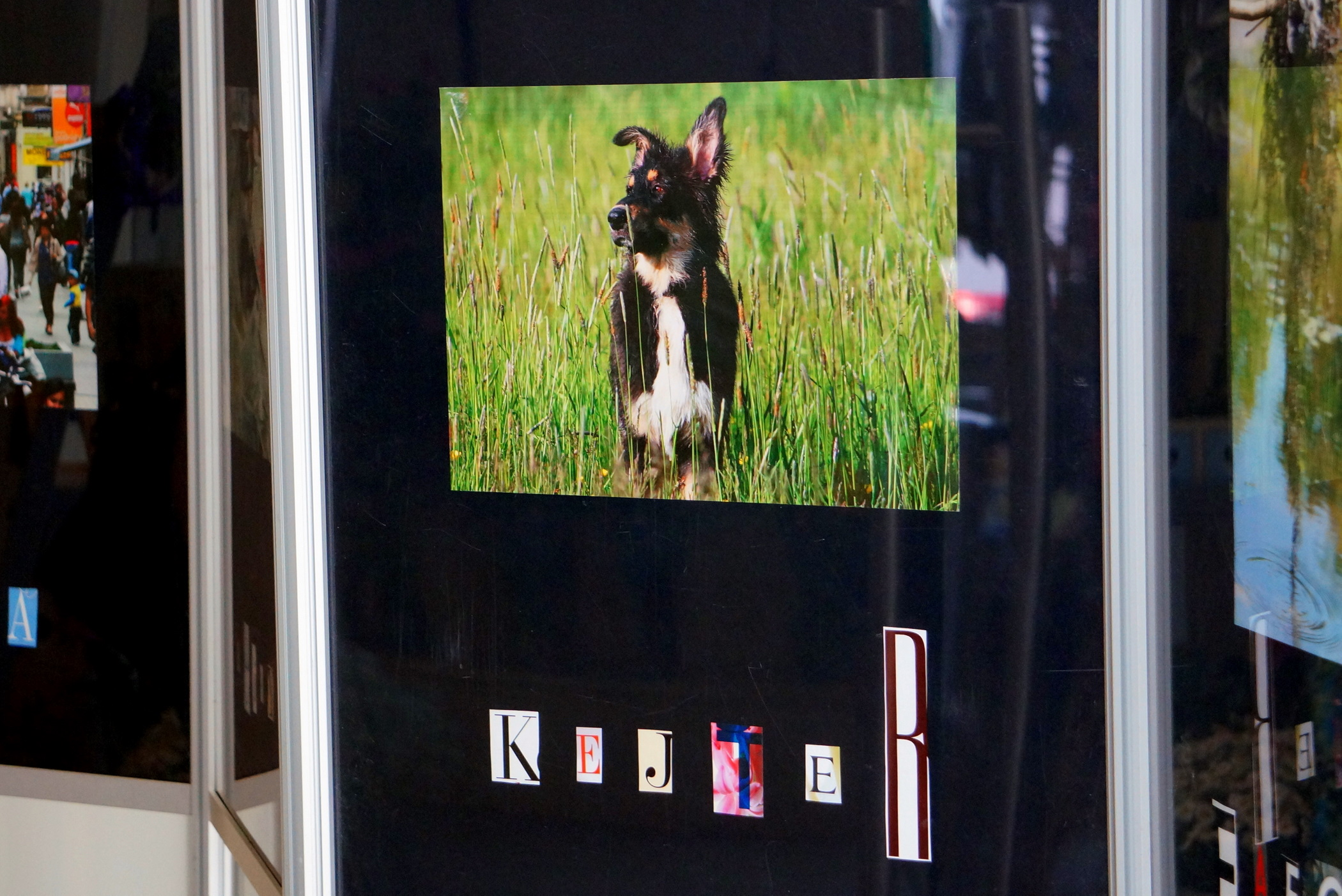 Przykład popularyzacji gwary poznańskiej. Plansze ze słowami gwarowymi eksponowane w centrum handlowym w Śremie.